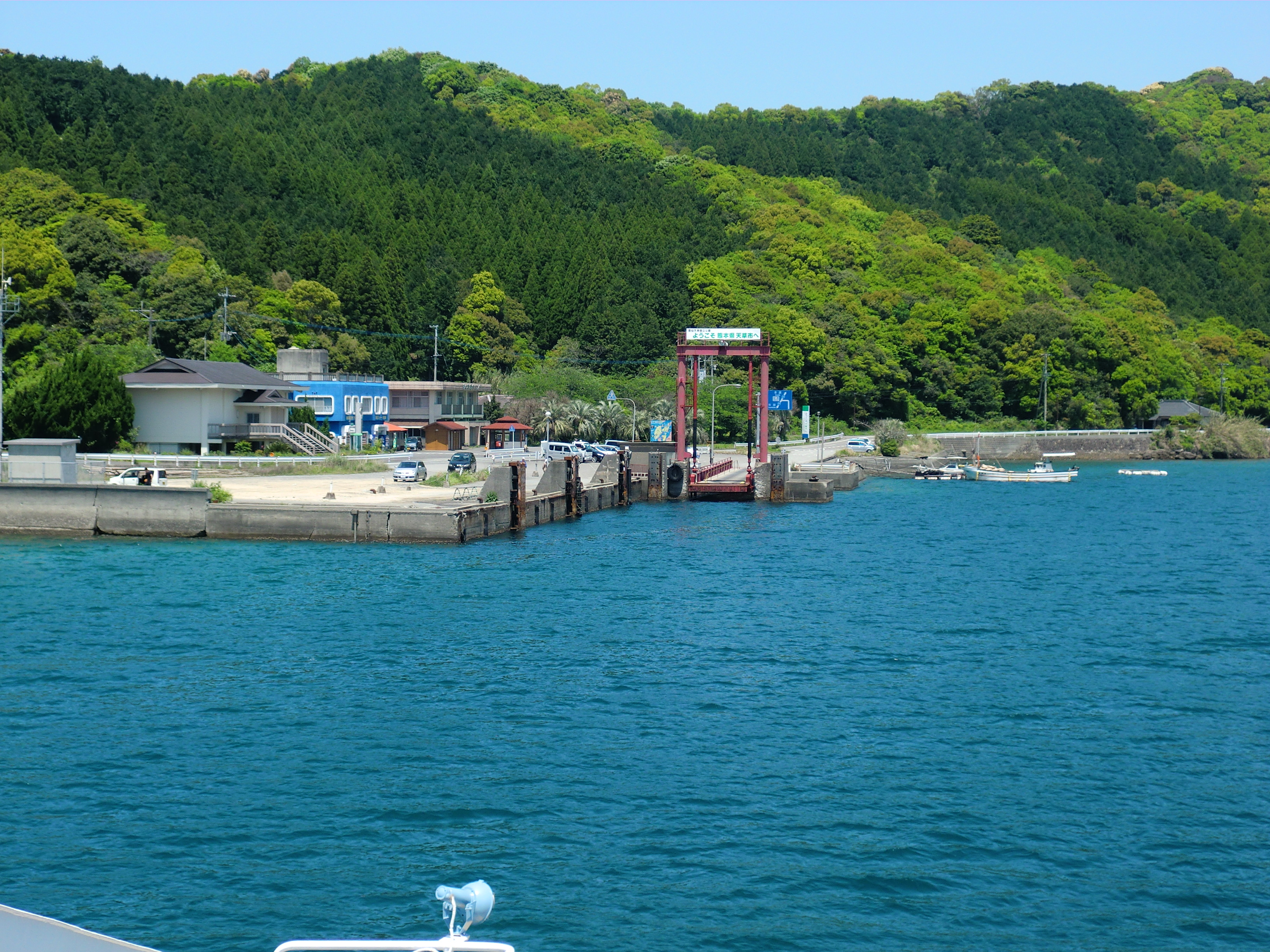 熊本県天草市にある中田（なかた）港